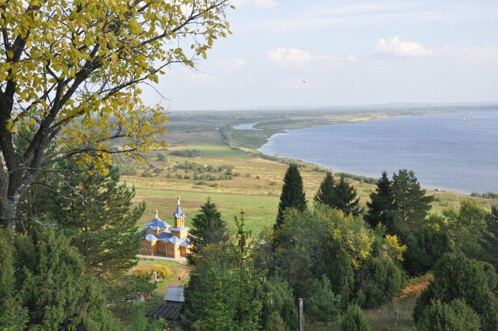 Нечкинский, Воткинский район This image is related to the protected area of Russia number 1800028